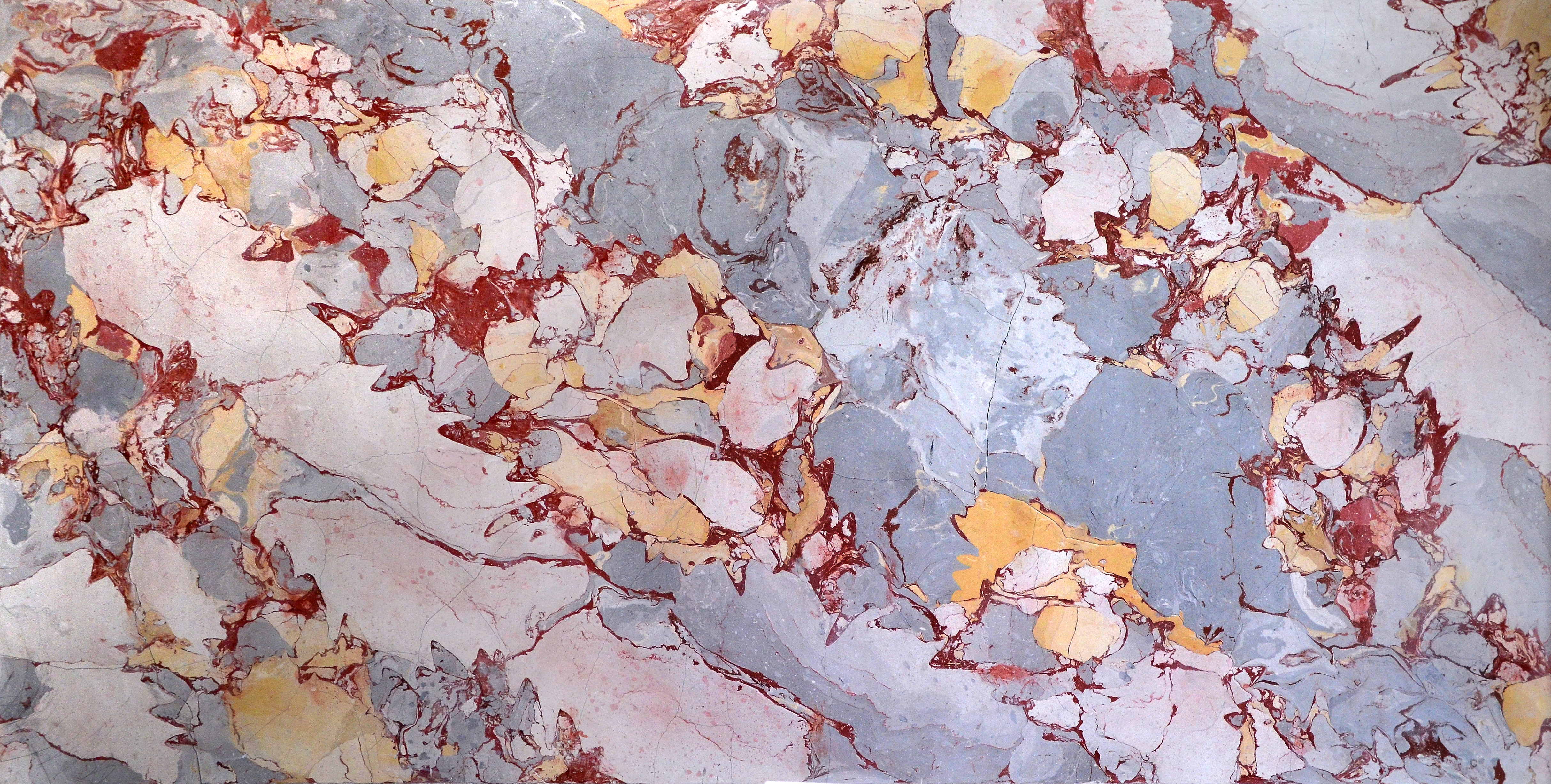 Marble photographed in the Musée des arts décoratifs de Strasbourg